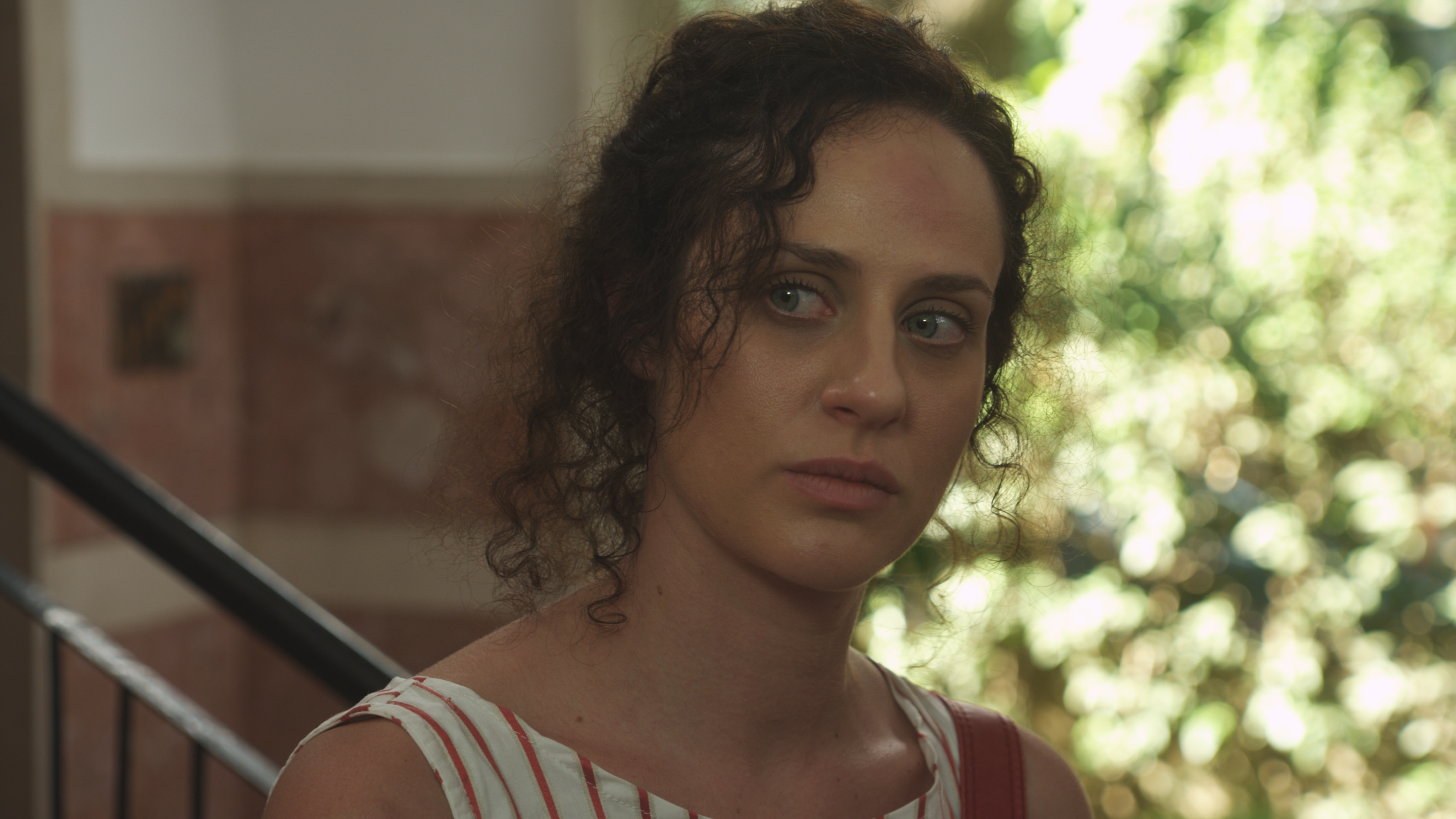 יעל טוקר בסרטו של דובר קוסאשווילי "רווקה פלוס"